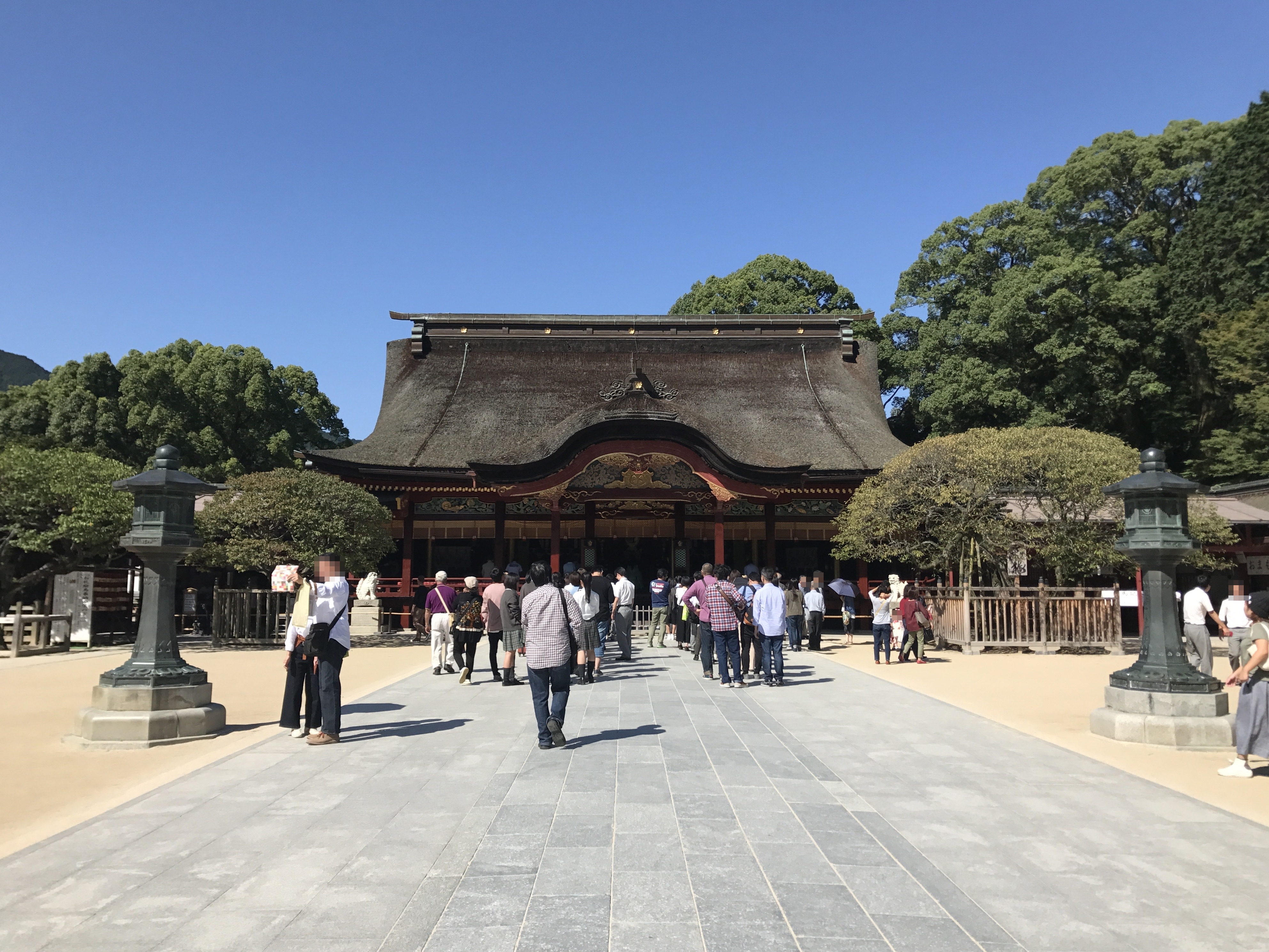 太宰府天満宮の御本殿